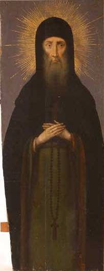 Saint Pimen the Faster from Nearer Caves of Kyiv Caves Monastery (died 1215) Пимен прозорливий посник з Ближніх печер (XI ст. - † 1215 р., Київ) — православний святий, преподобний. Чернець Печерського монастиря.. Пам'ять 11 жовтня і 9 вересня. Вів дуже суворий спосіб життя і строго постився. Мав дар зціляти хворих і передбачати події - провістив за 2 роки власну смерть. Згадується в "Патерику Печерському" в житії прп. Микити Затвірника за ігуменства прп. Никона Великого, тобто не пізніше 1088 р. До середини ХII ст. його життя відносили помилково, плутаючи з його тезкою, до ігумена Пимена пісника (1132-1141). Помер в один день зі священномучеником Кукшою, про загибель якого від рук язичників прп. Пимен провістив на церковній службі: "Брат наш Кукша противу света убиен бысть". Його мощі спочивають у Ближніх печерах.